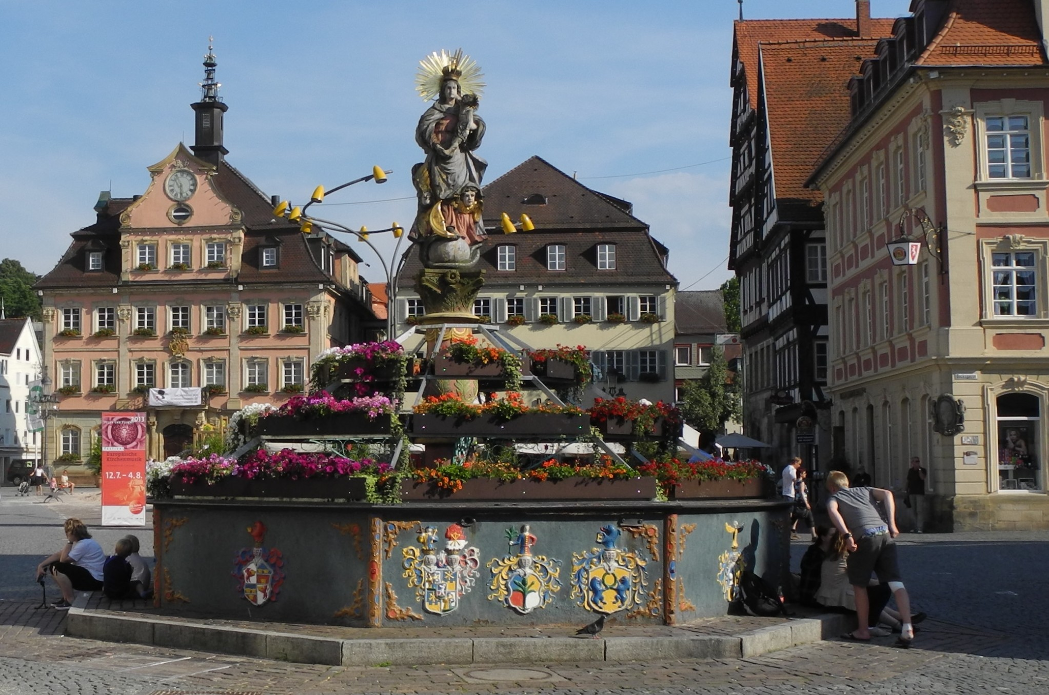 Schwäbisch Gmünd - Marktplatz mit Rathaus ab 1760_02